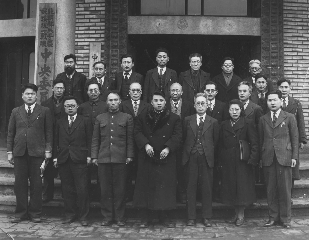 1946년 7월 22일 조직된 북조선 민주주의 민족통일전선(北朝鮮 民主主義 民族統一戰線) 청사 앞에 선 중앙위원 간부 일동 : 앞줄 맨 왼쪽은 최용건, 세 번째부터 김책, 김일성, 김달현, 허정숙, 리강국 순. (외투를 입은 것으로 보아 창립 당시인 7월이 아닌 1946년 말~1947년 초이거나 1947년 말 경의 사진으로 보임.) 북조선 민주주의 민족통일전선(北朝鮮 民主主義 民族統一戰線) : 다음백과 북조선 민주주의 민족통일전선위원회 결성에 대한 보고(北朝鮮 民主主義 民族統一戰線委員會 結成에 對한 報告) : 민주조선 자주독립의 길, 김일성 장군 중요 논문집, 북조선로동당중앙본부 선전선동부